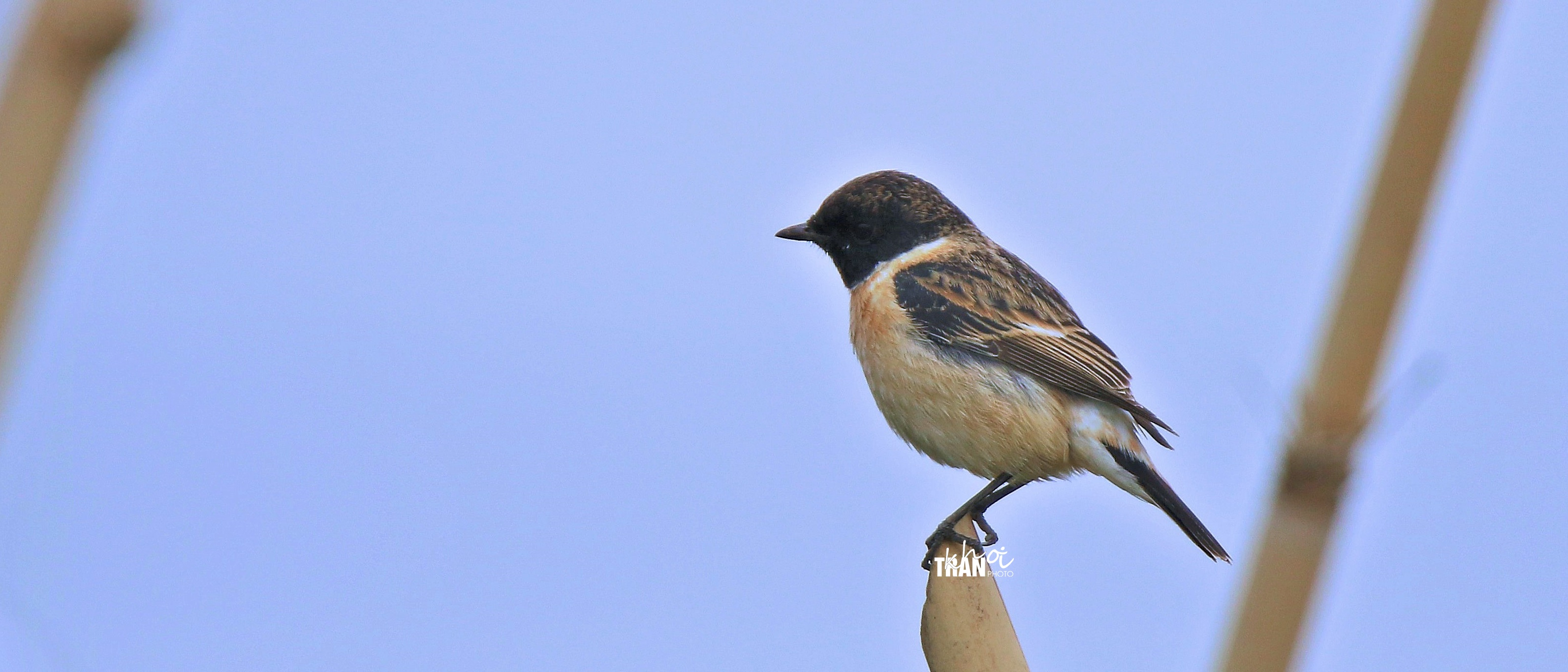 Sẻ Bụi đầu đen - Stejneger's Stonechat